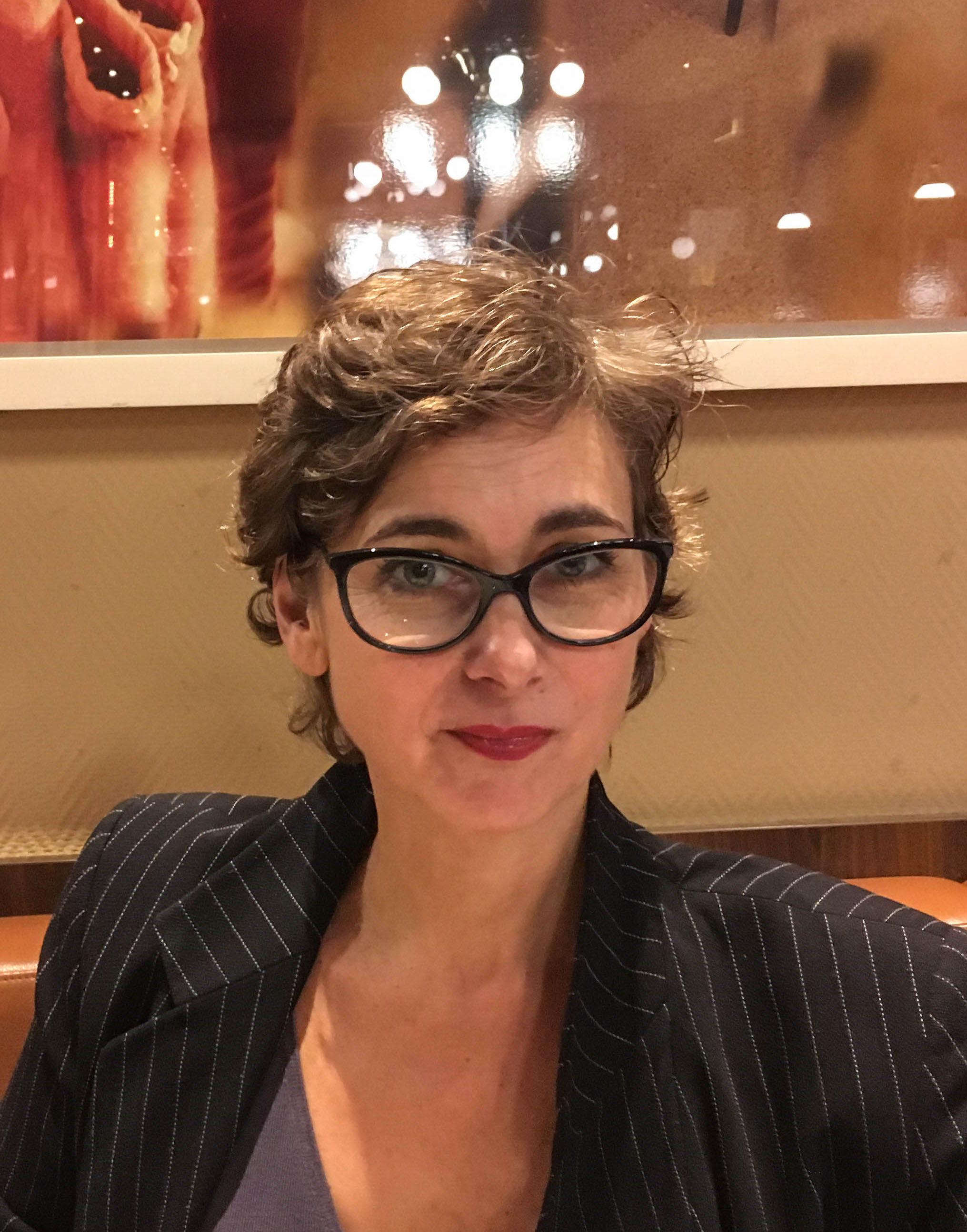 Katharina Struber im Cafe Hummel in Wien am 5.11.2018